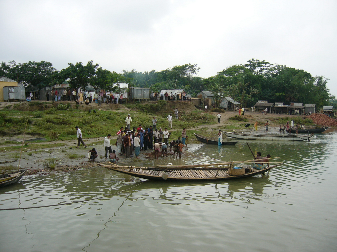 Goalanda Ghat Faridpur Bangladesh